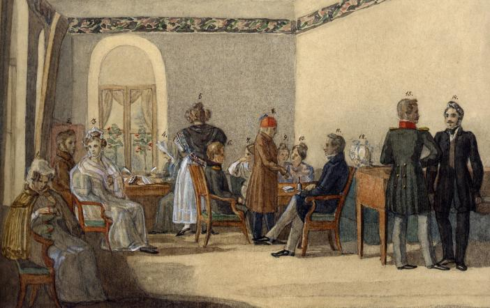 Гостиная в доме Олениных в Приютино. Изображены: М. Ф. Кохнаева, Ал. А. Оленин, А. А. Оленина, Е. М. Оленина, А. Д. Блудова, В. А. Савельев, Л. Д. Блудова, А. Т. Домрачеева, В. А. Оленина, А. Н. Оленини, Е. М. Оленина, П. А. Оленини, Ф. Д. Алопеус, Ж. Дамето.